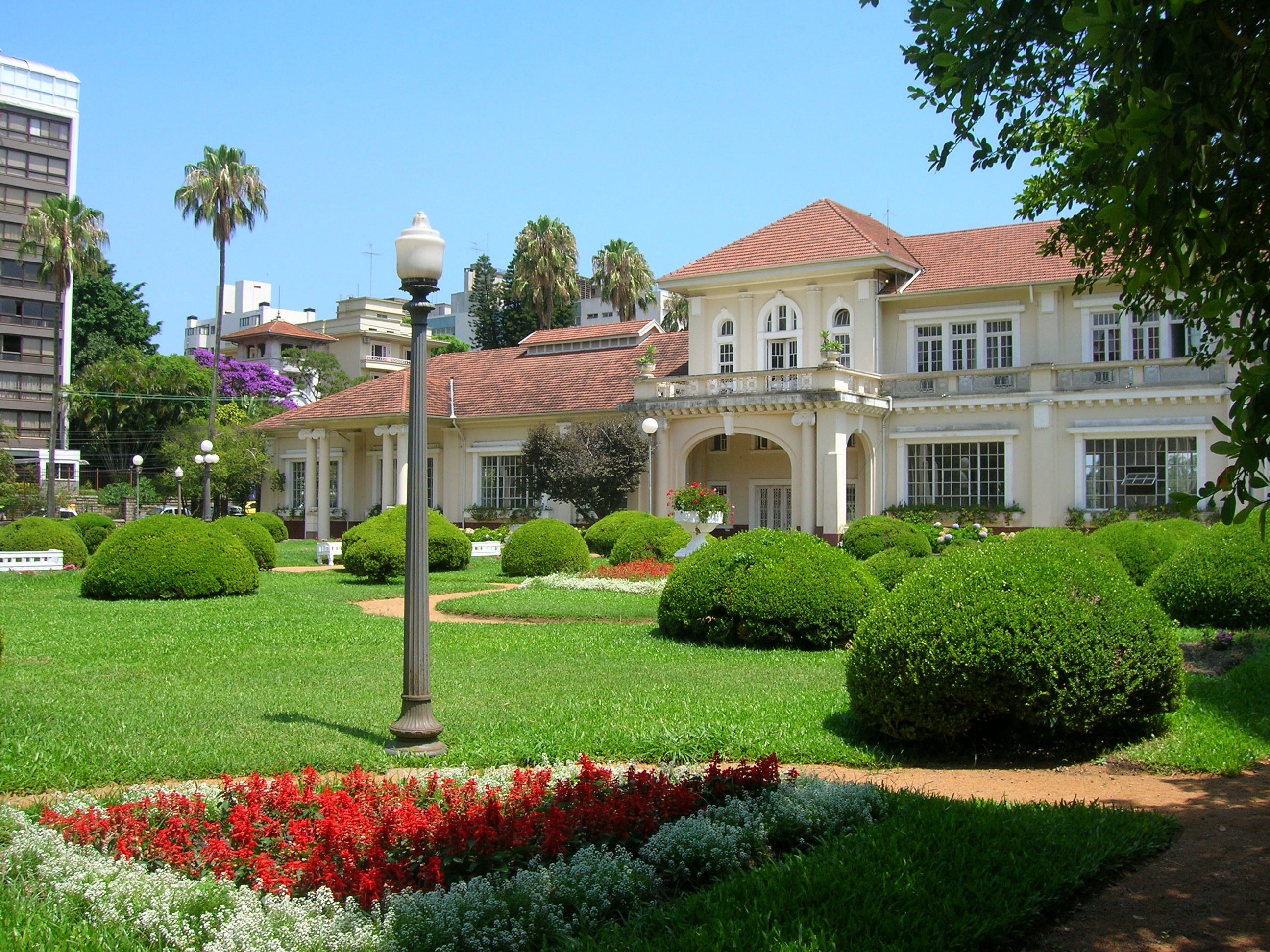 A Hidráulica Moinhos de Vento em Porto Alegre, Brasil.